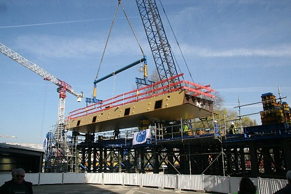 Pose du premier tronçon du tablier du pont Confluences à Angers (Maine-et-Loire, France)